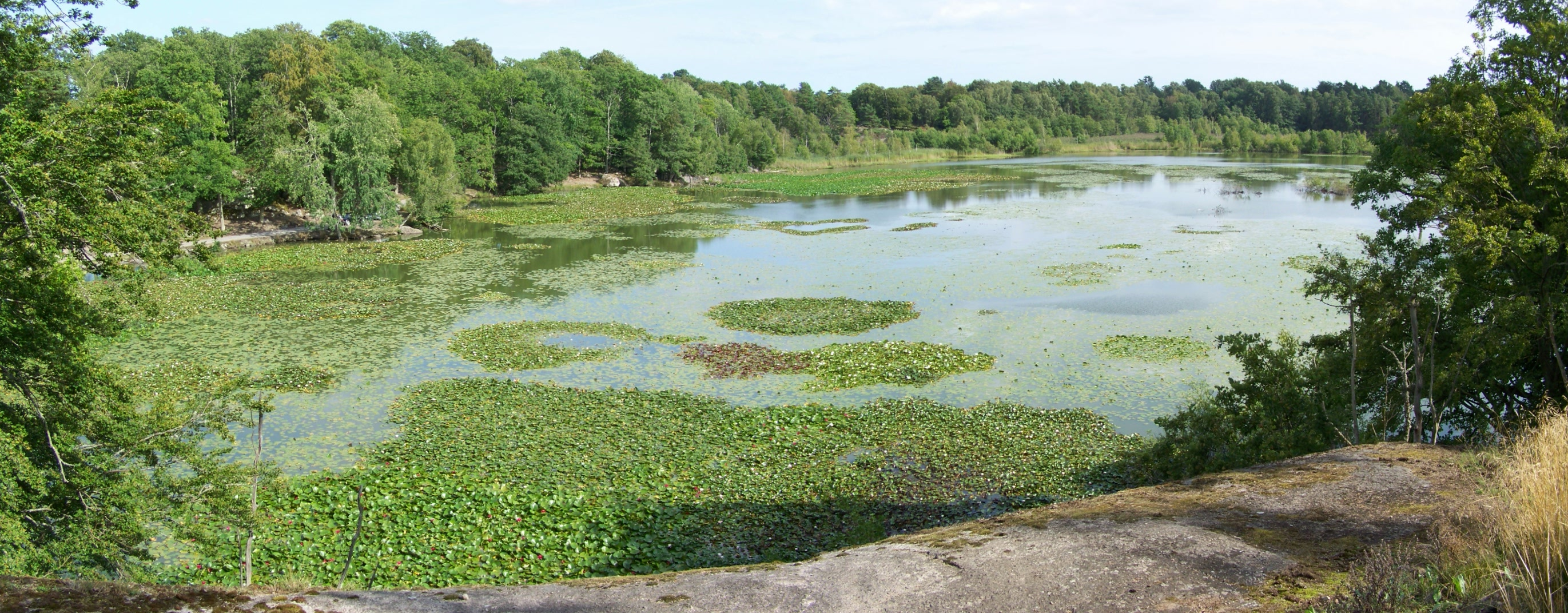 In Schweden. Eriksberg, Blekinge